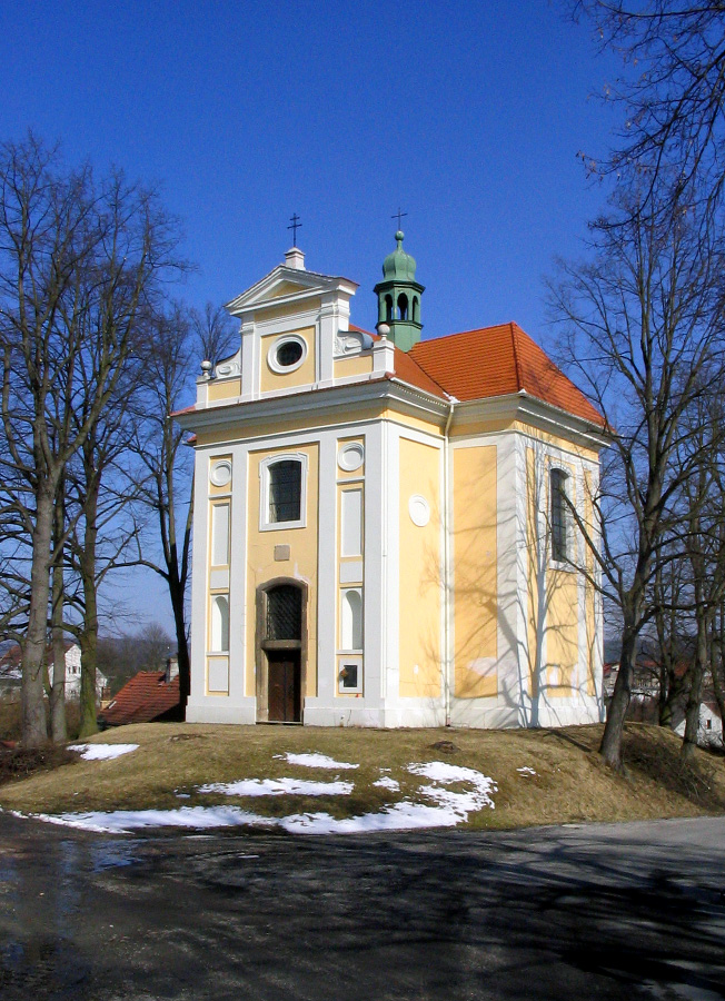 Barokní kaple sv. Kateřiny, Nynice.